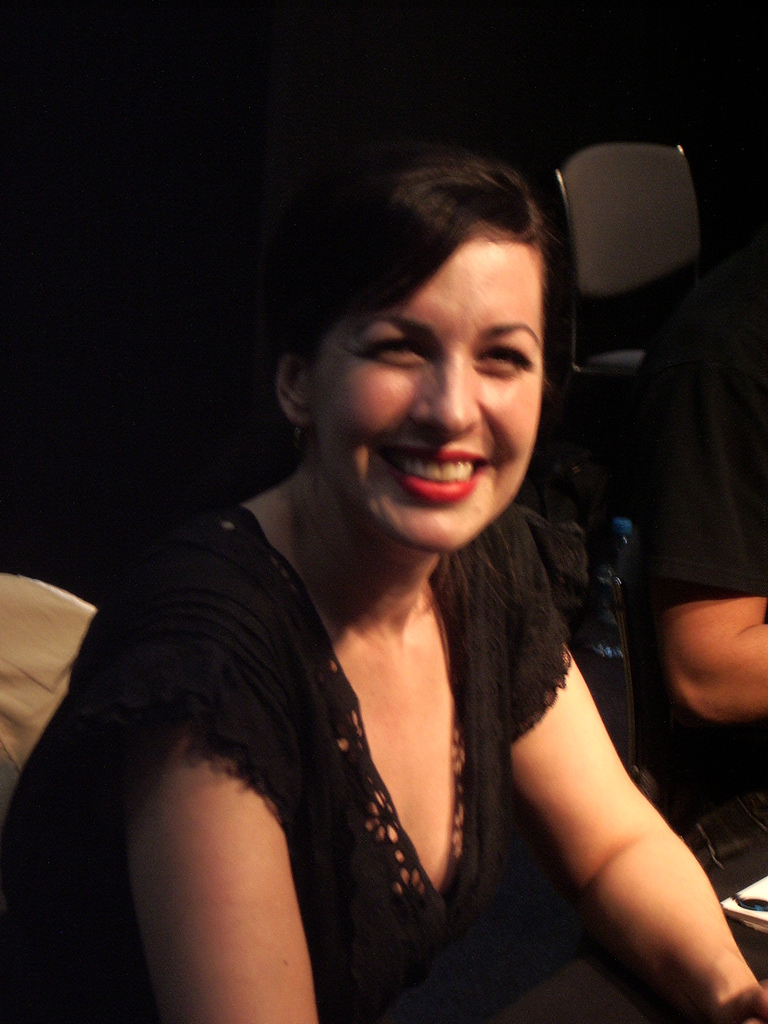 Grey DeLisle